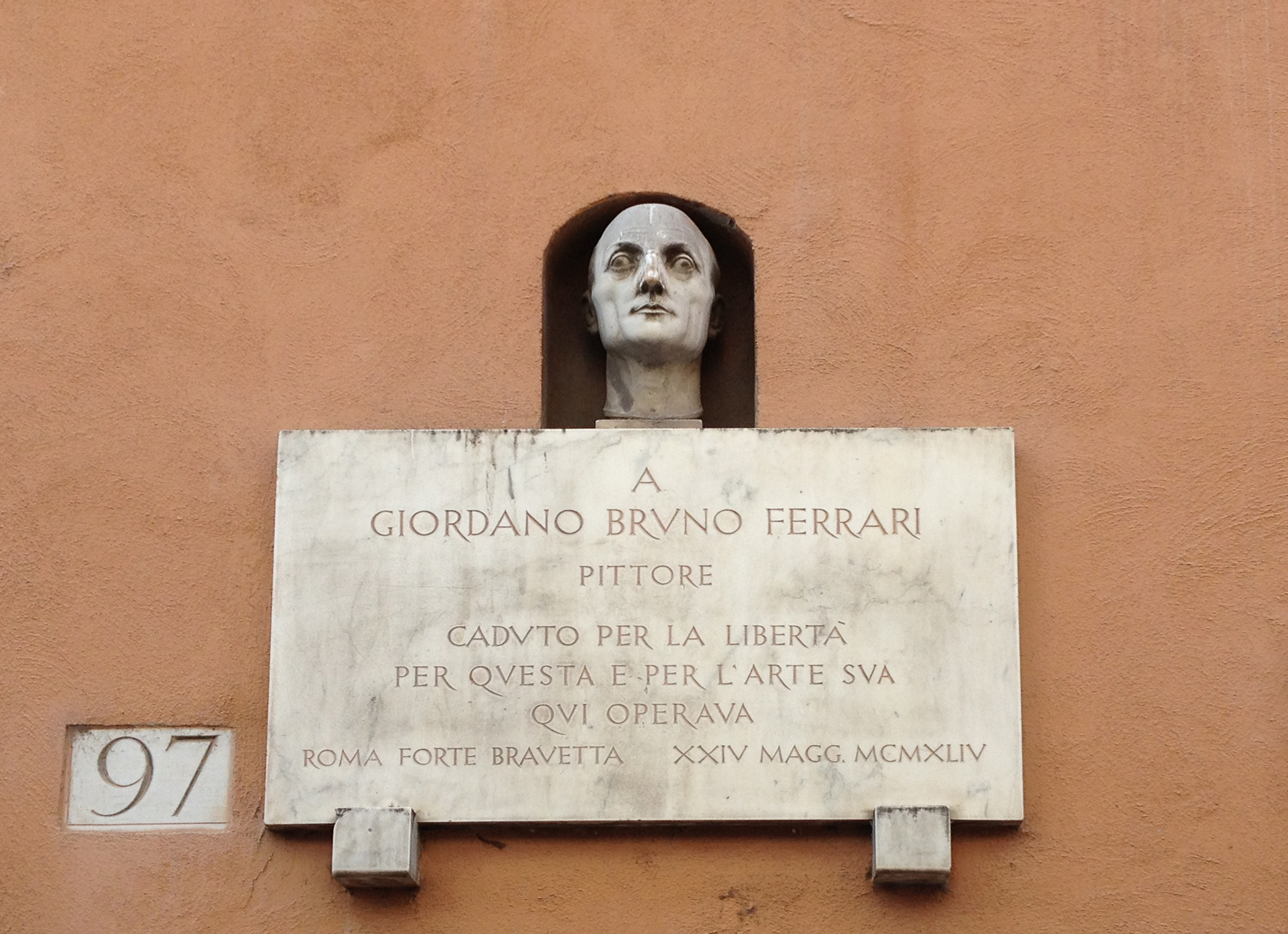 Lapide commemorativa del pittore romano Giordano Bruno Ferrari a Via Margutta